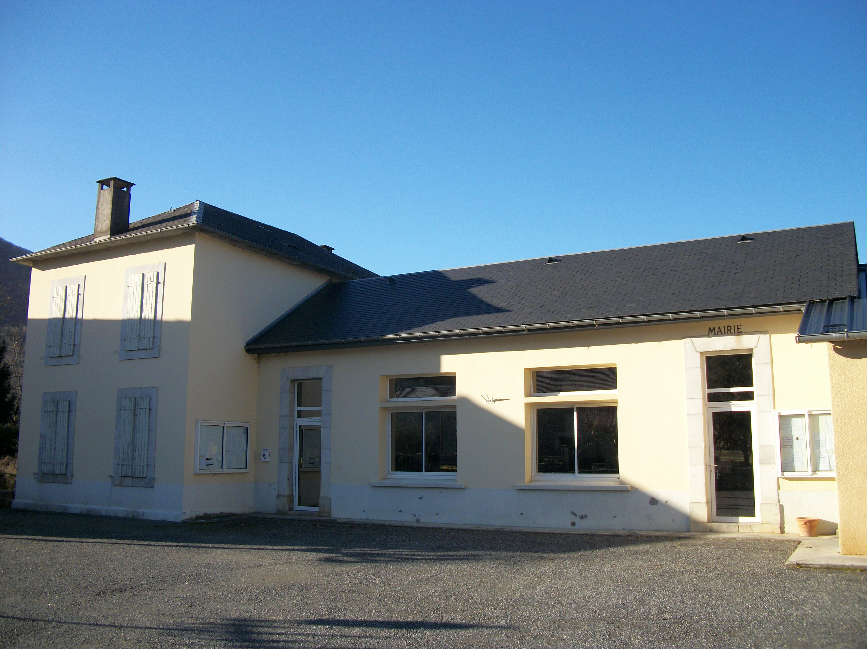 La mairie